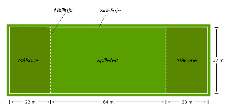 Ultimate: Oversikt over banen, utendørs.